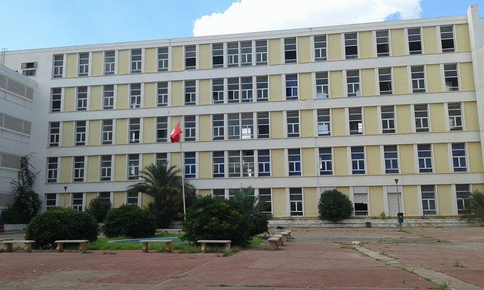 Vue de la place principale de l'université (Place Rouge)